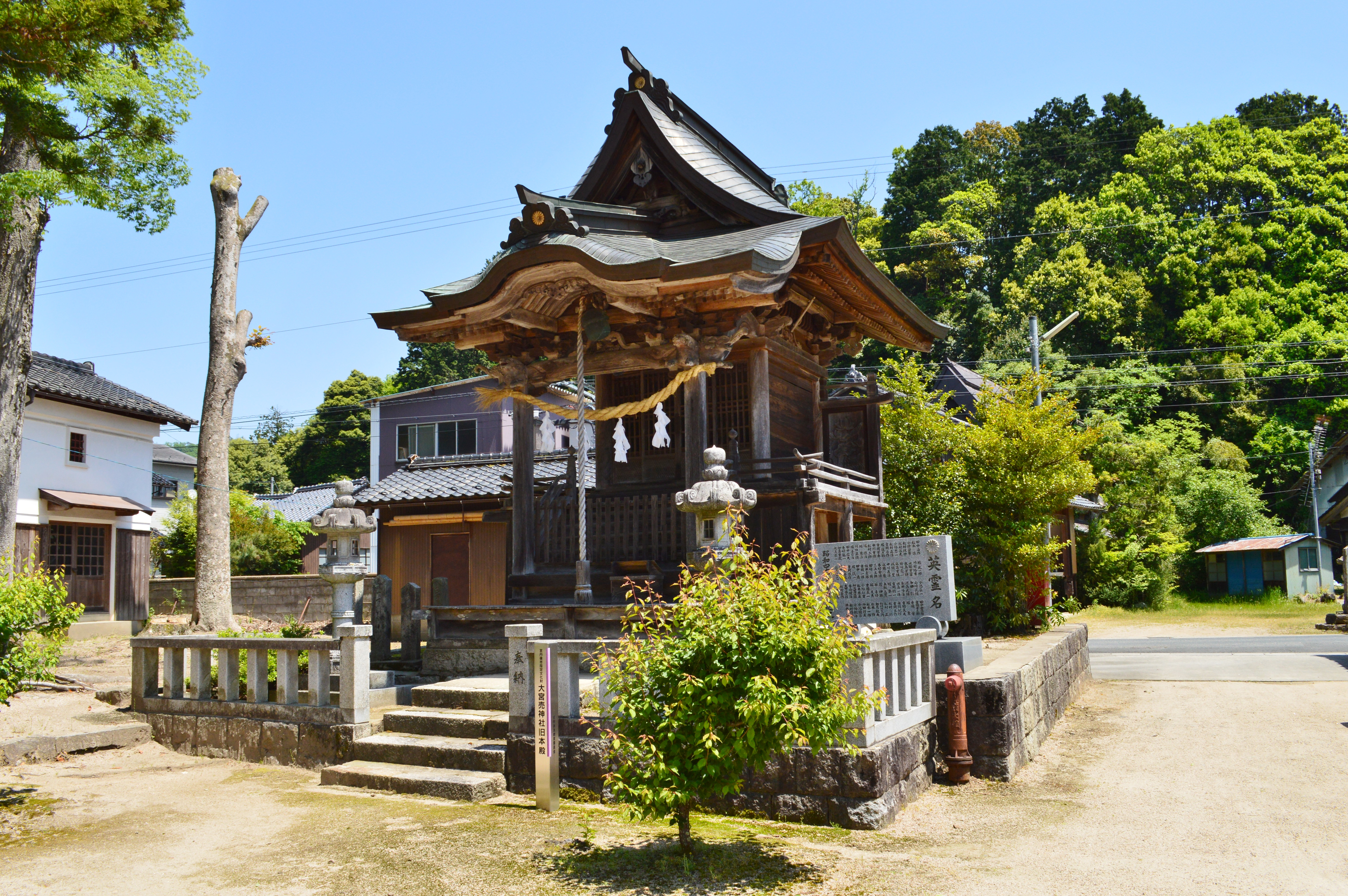 大宮売神社 旧本殿 (忠霊社)